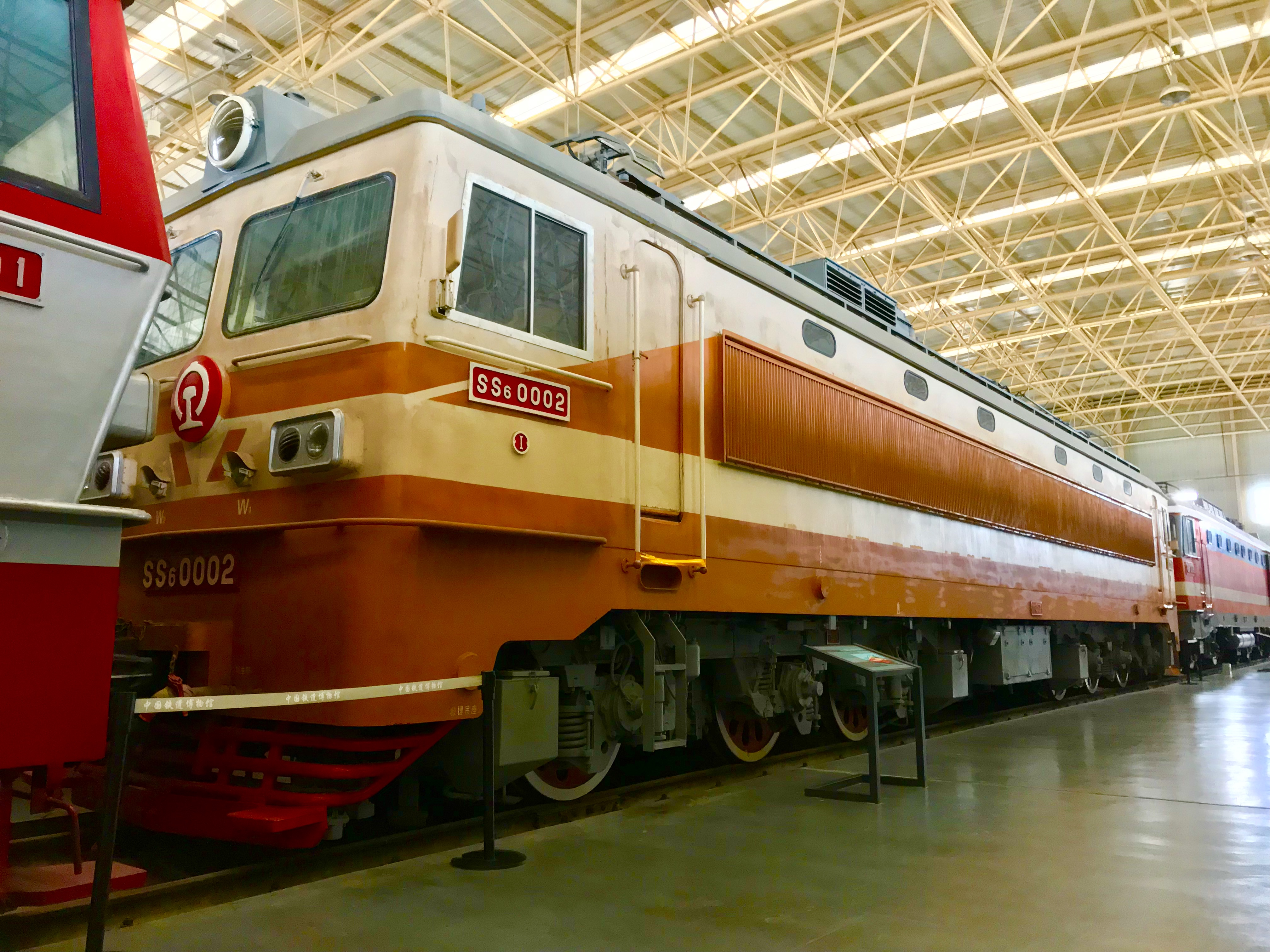 保存于中国铁道博物馆的韶山6型0002号电力机车